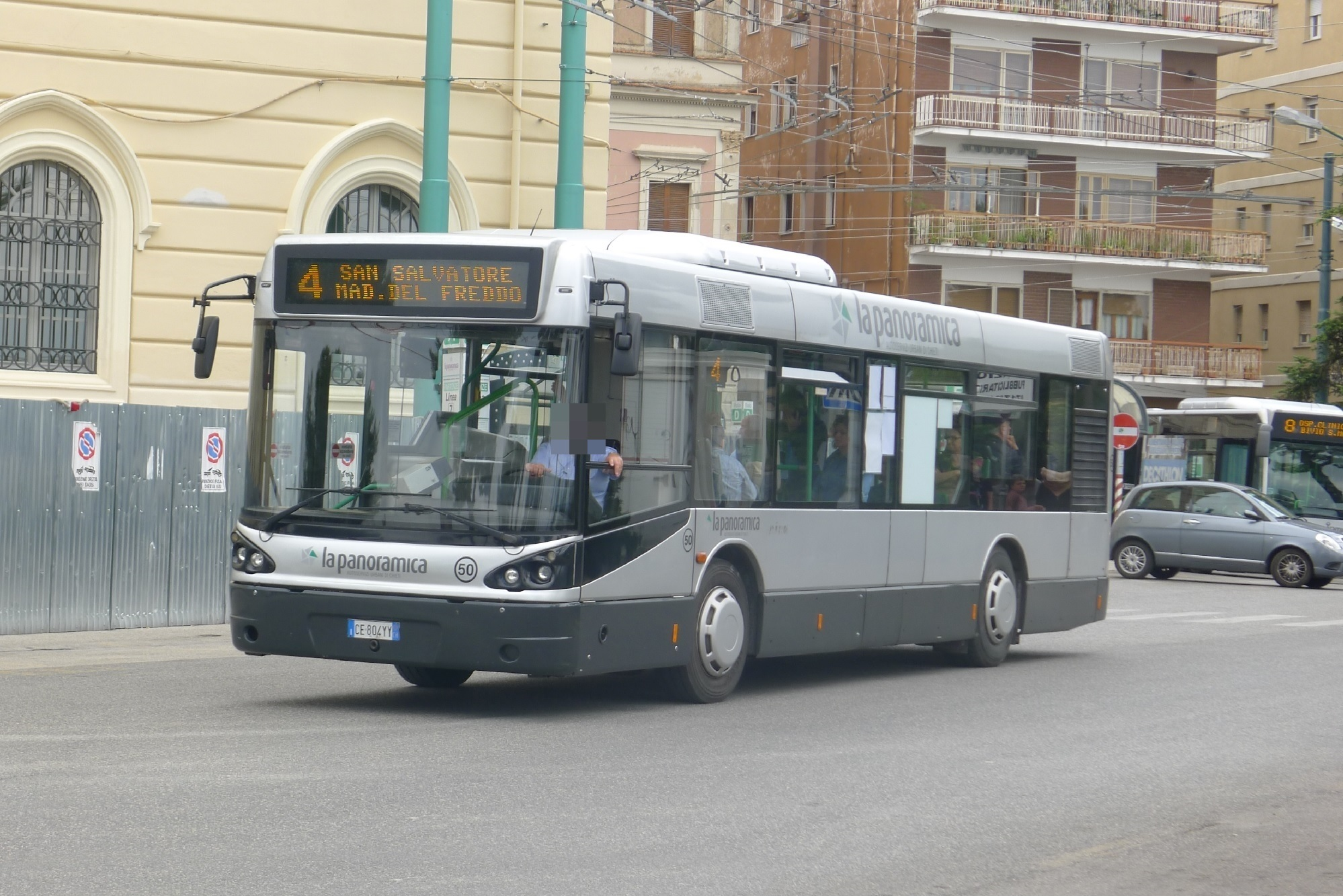 La Panoramica 50